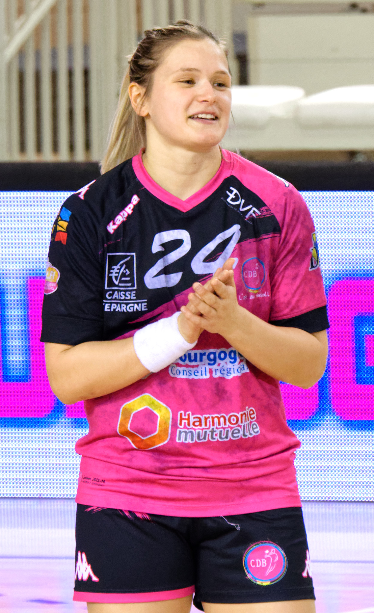 Rencontre de championnat entre Issy Paris Hand et Dijon. A Issy Les Moulineaux, le 5 mars 2016.